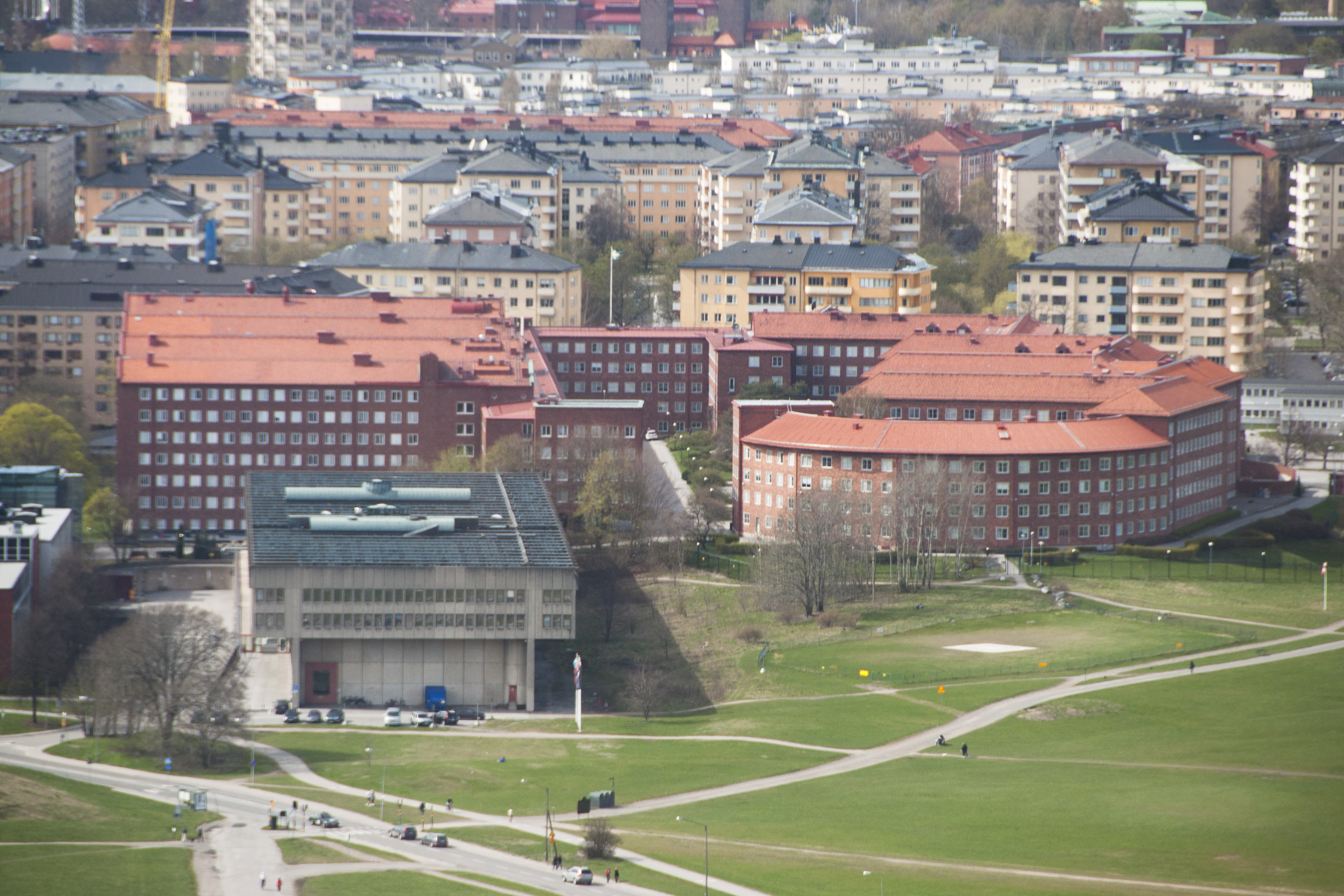 Tre Vapen - FMV och Krigsarkivet. Byggnadsår 1942—48. Arkitekt, Cyrillus Johansson